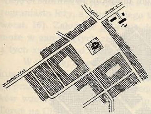 Беларуская (тарашкевіца): Нягневічы (Niahnievičy)